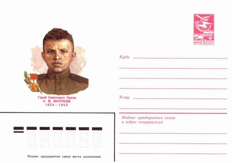 Художественные маркированные конверты 1983 года.